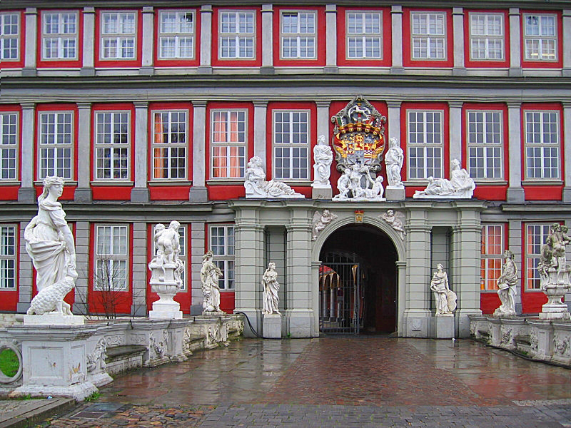 Wolfenbüttel Schloss